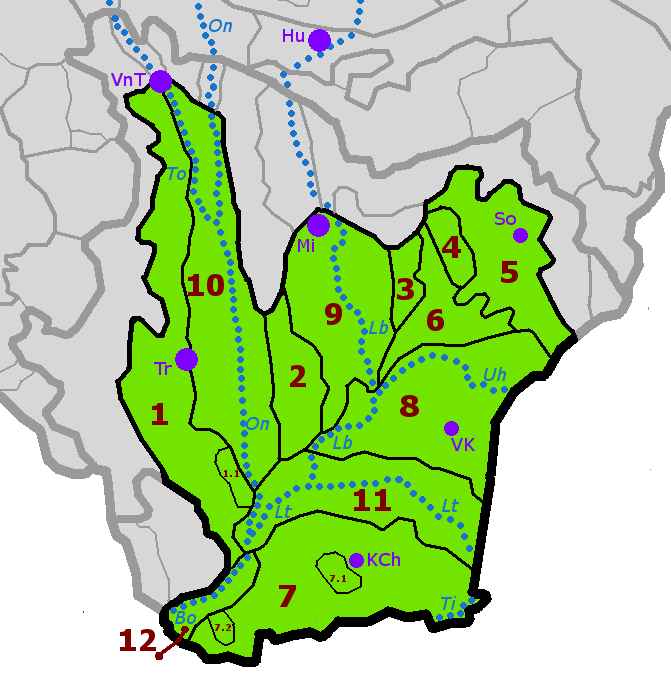 Členění geomorfologického celku Východoslovenská rovina (zeleně). Schematicky jsou znázorněny též nejvýznamnější vodní toky a města. Východoslovenská rovina Trebišovská tabuľa Veľký vrch Malčická tabuľa Iňačovská tabuľa Závadská tabuľa Sobranecká rovina Senianska mokraď Medzibodrocké pláňavy Chlmecké pahorky Tarbucka Kapušianske pláňavy Laborecká rovina Ondavská rovina Latorická rovina Bodrocká rovina řeky / rivers Bo – Bodrog Lb – Laborec Lt – Latorica On – Ondava Ti – Tisa To – Topľa Uh – Uh města / towns Hu Humenné KCh – Kráľovský Chlmec Mi – Michalovce So – Sobrance Tr – Trebišov VnT – Vranov nad Topľou VK – Veľké Kapušany